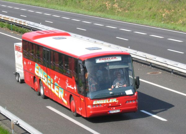 Autocar interurbain Neoplan Euroliner.